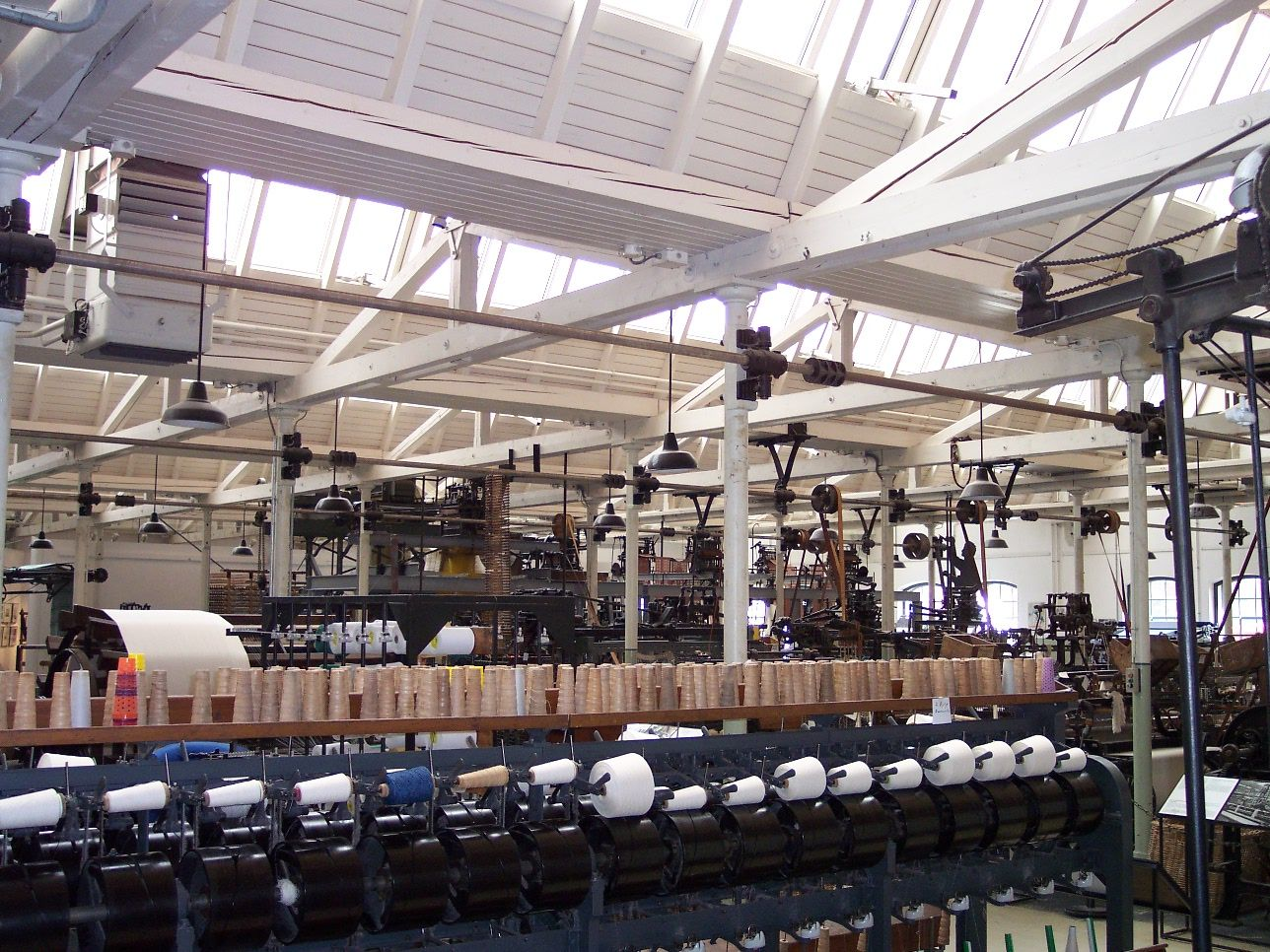 Bocholt Saal